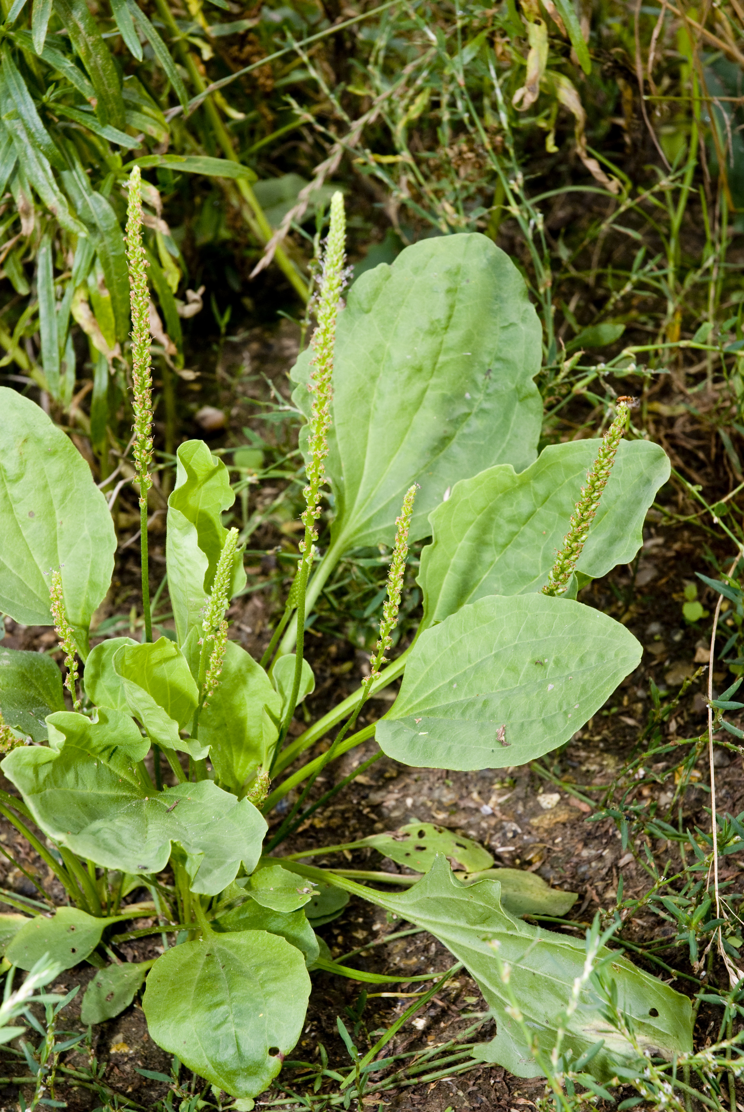 Plantago major-subsp-major Vallée de Grâce à Amiens (Somme), France